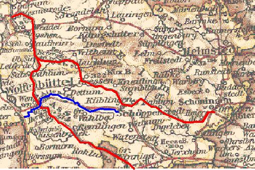 Kartenausschnitt (eigener Scan aus Andrees Handatlas 1906, Eigentum), selbst um Streckenführung (rot) und Altenauverlauf (blau) graphisch ergänzt.